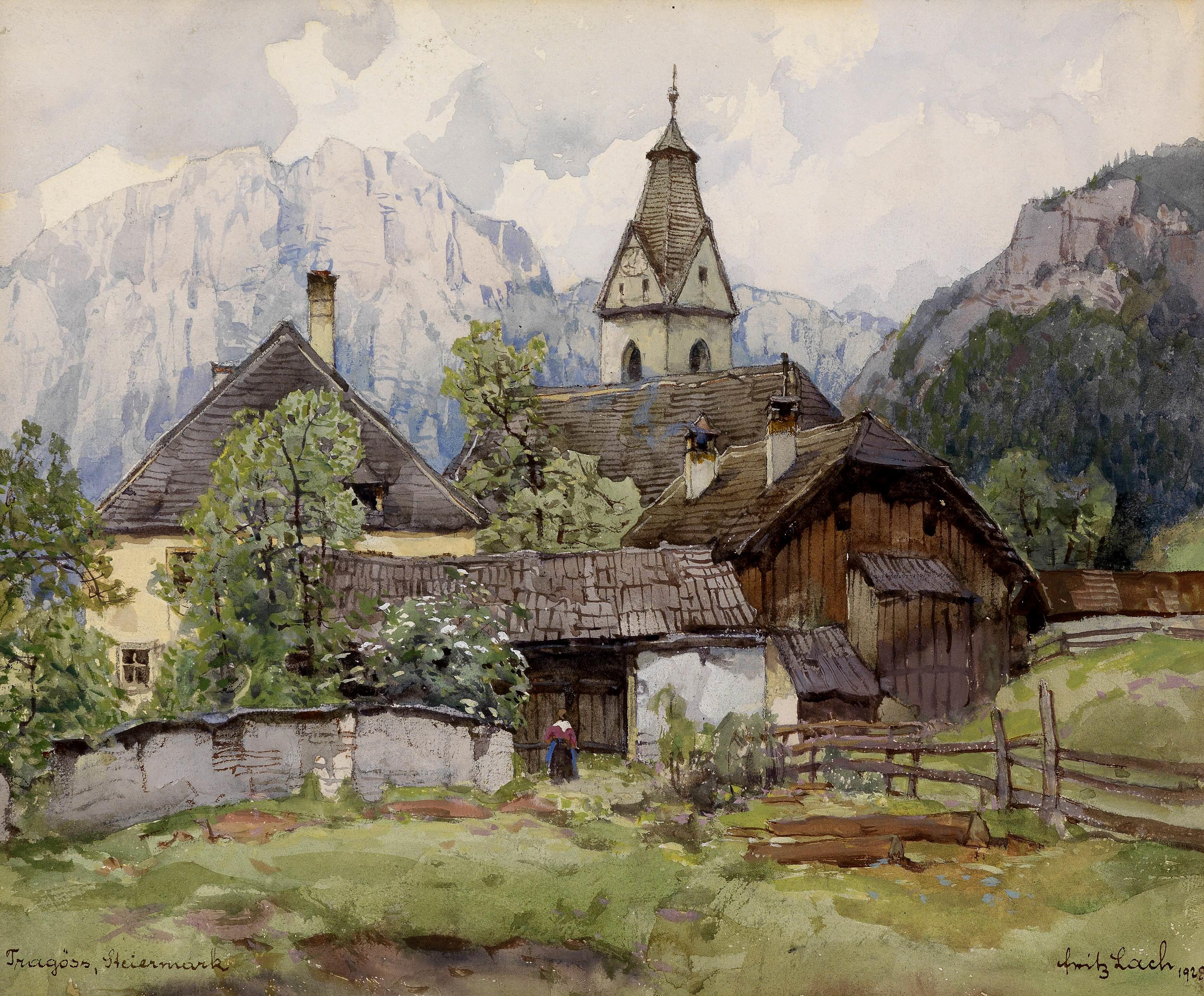 Blick auf Tragöss, Steiermark. Blickrichtung Nordwest auf die Pribitz, 1579 m, in der Hochschwab-Gruppe